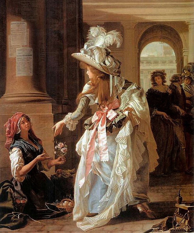 Michel Garnier (1753–1829): Kurtisane und Bauernmädchen unter den Arkaden des Palais Royal in Paris (La Ravissante du Palais Royal). Öl auf Leinwand, 46 x 38 cm. Collection of Lynda and Stewart Resnick, Los Angeles County Museum of Art. An der Säule über der Signatur Erlasse des Herzogs von Orléans. Im 19. Jahrhundert wurde das Bild Die Blumenverkäuferin (La marchande de fleurs) genannt. Vgl. Objets d’art (…) provenant de la collection de feu Mme A… de Rouen (…), Escribe, Bloch, Paris 1879, S. 26.